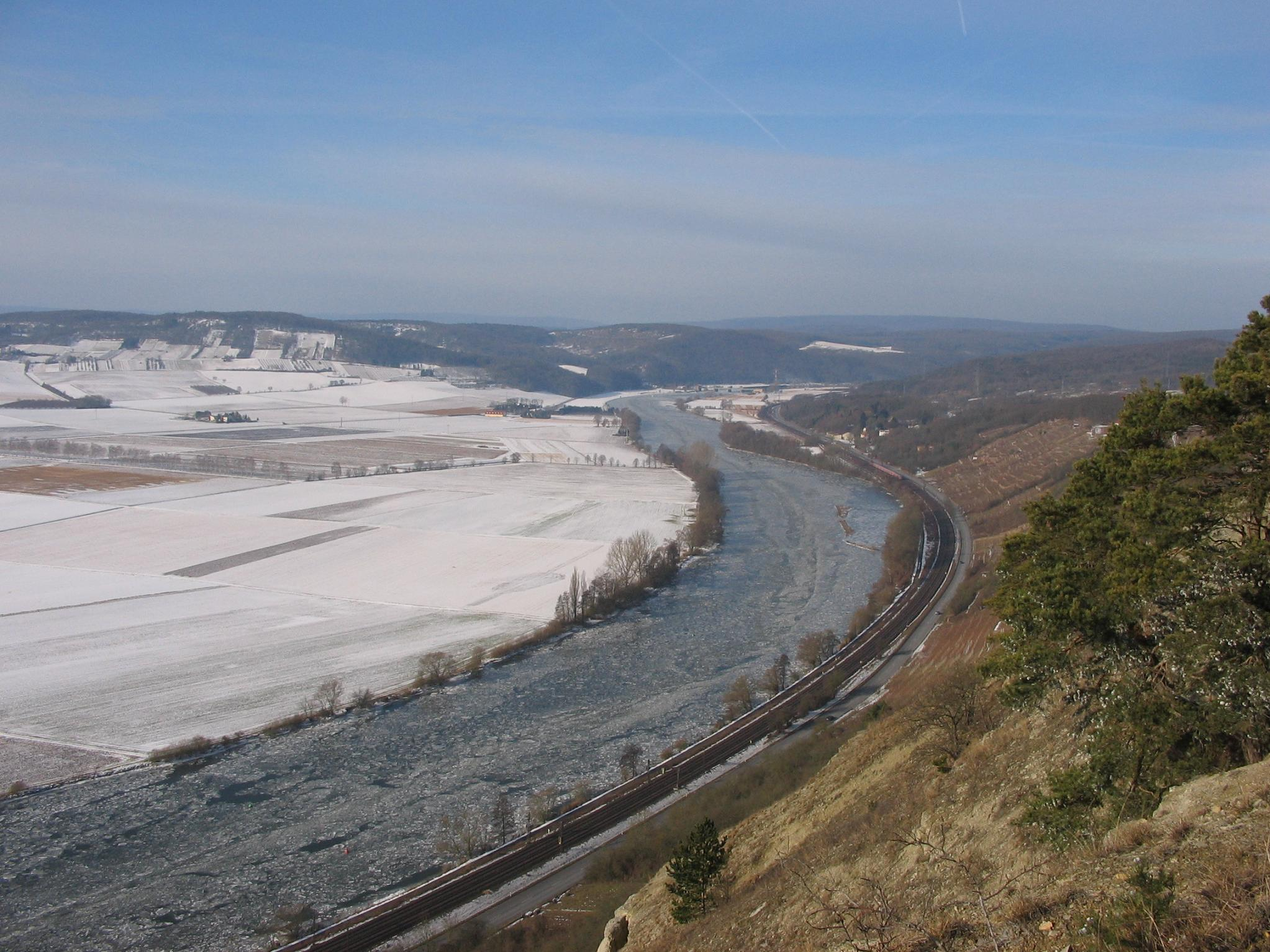 selbst fotografiert